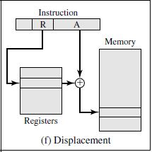 Adresimi me zëvendësim